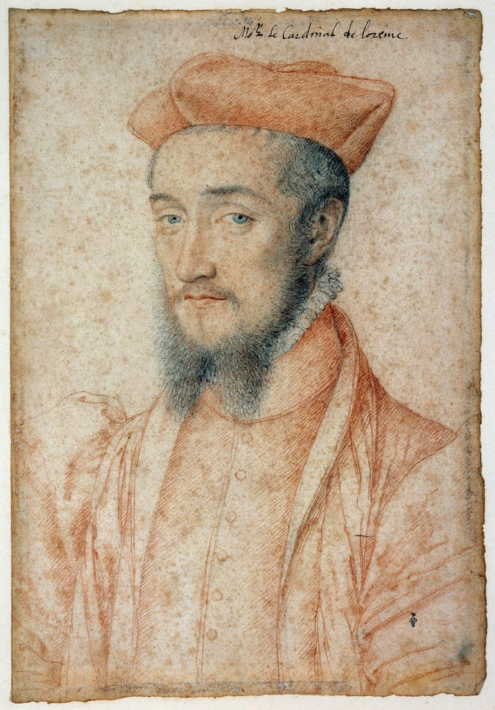 Charles cardinal de Lorraine (1525-1574)